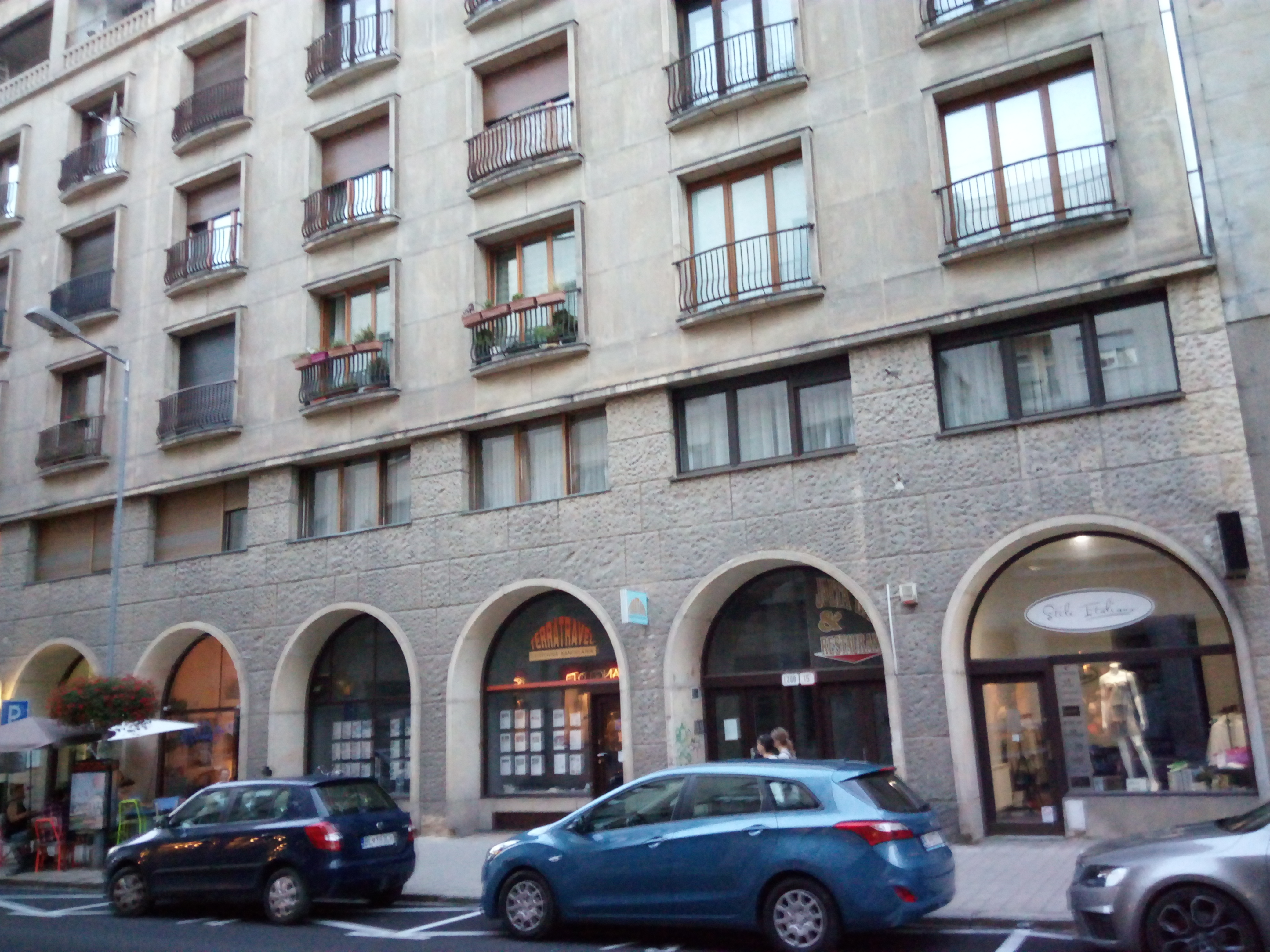 Gorkého 15, Staré Mesto, Bratislava